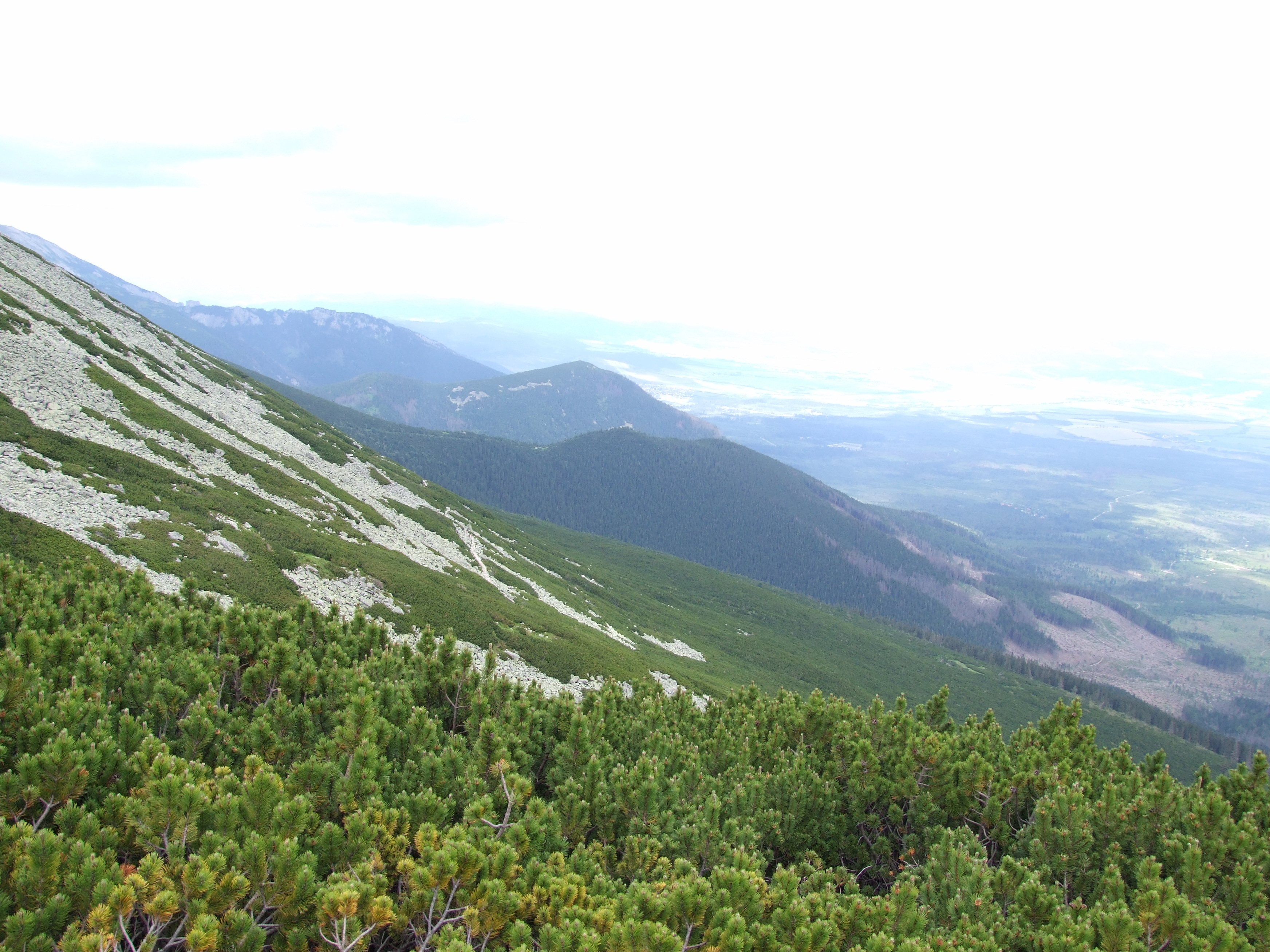 Huncowska Ubocz. Widok ze szlaku na Rakuską Przełęcz